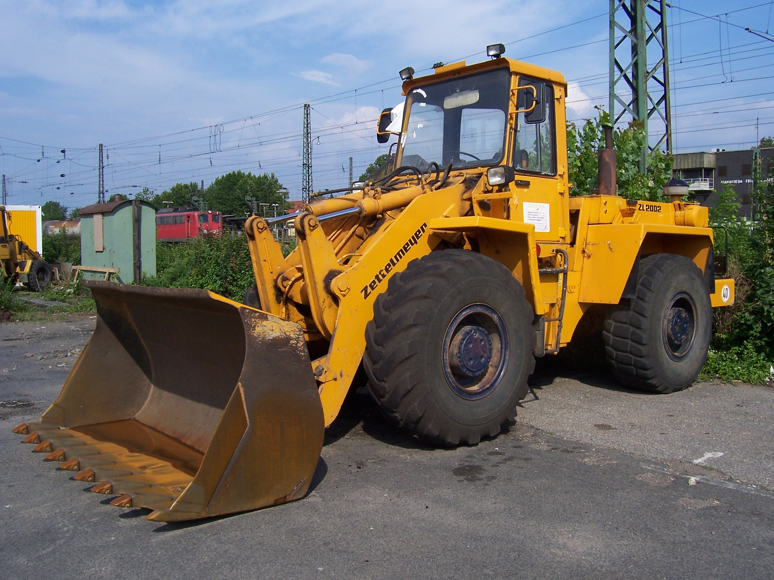 Ein Zettelmeyer ZL 2002 Radlader in Mannheim-Friedrichsfeld